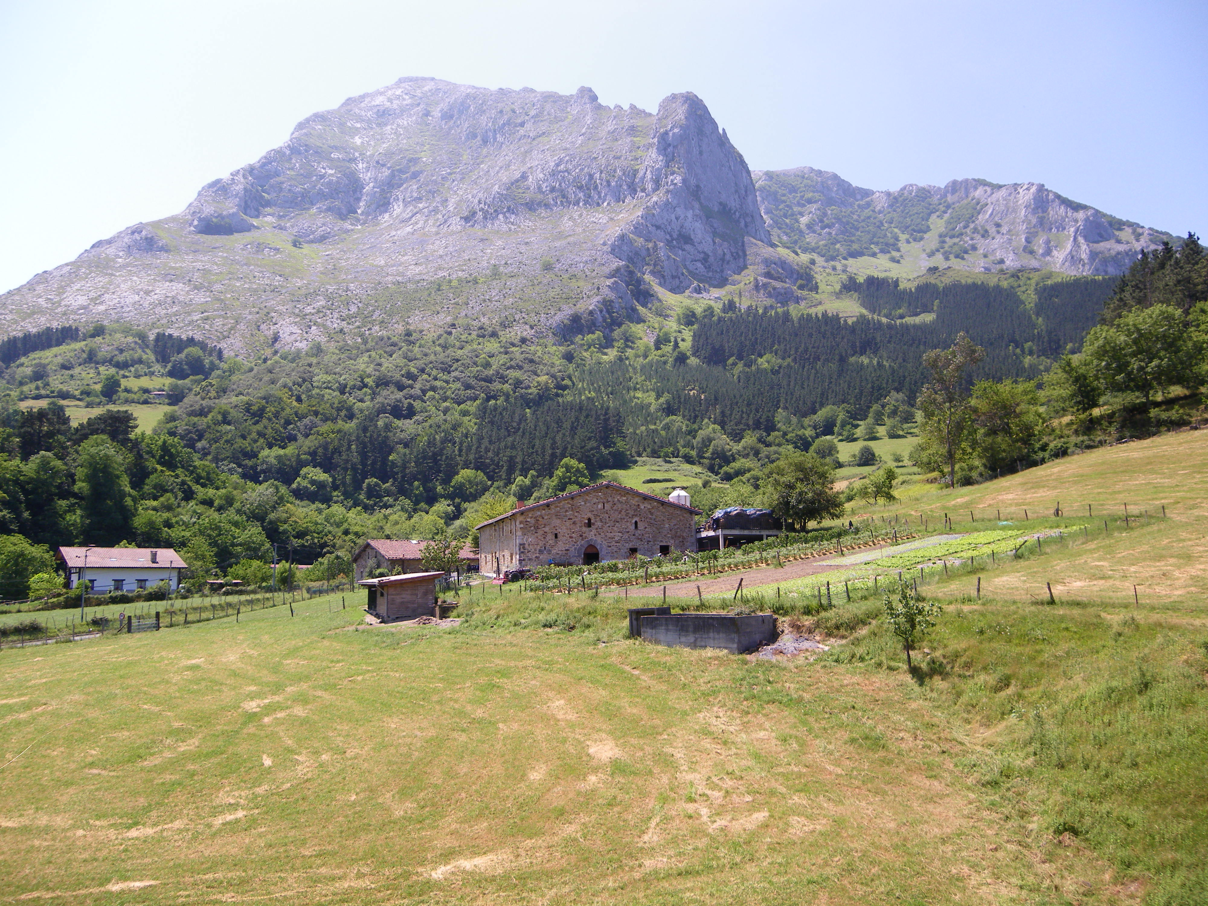 Anboto mendipean dagoen Urrutia baserriaren inguruko paisaia ikusgarria. Atxondo, Bizkaia, Euskal Herria.